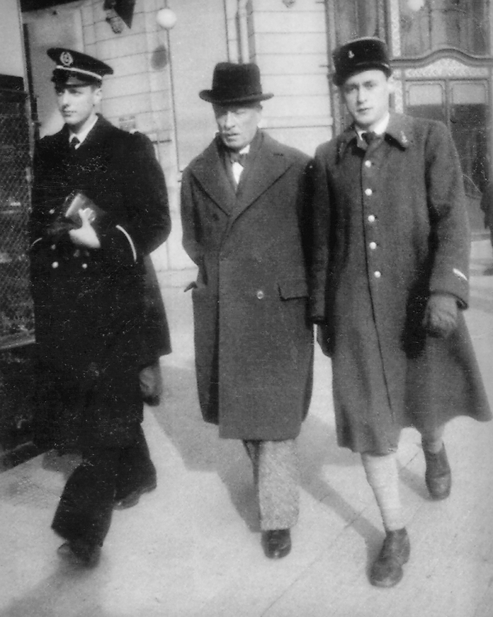 Arthur Bommelaer entouré de son fils Michel (sur sa gauche) et André (sur sa droite)